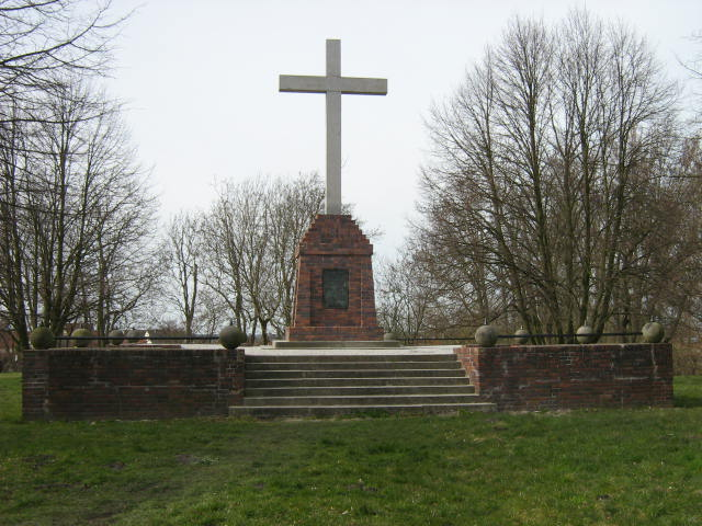 Krzyż na wzgórzu w Usedomie